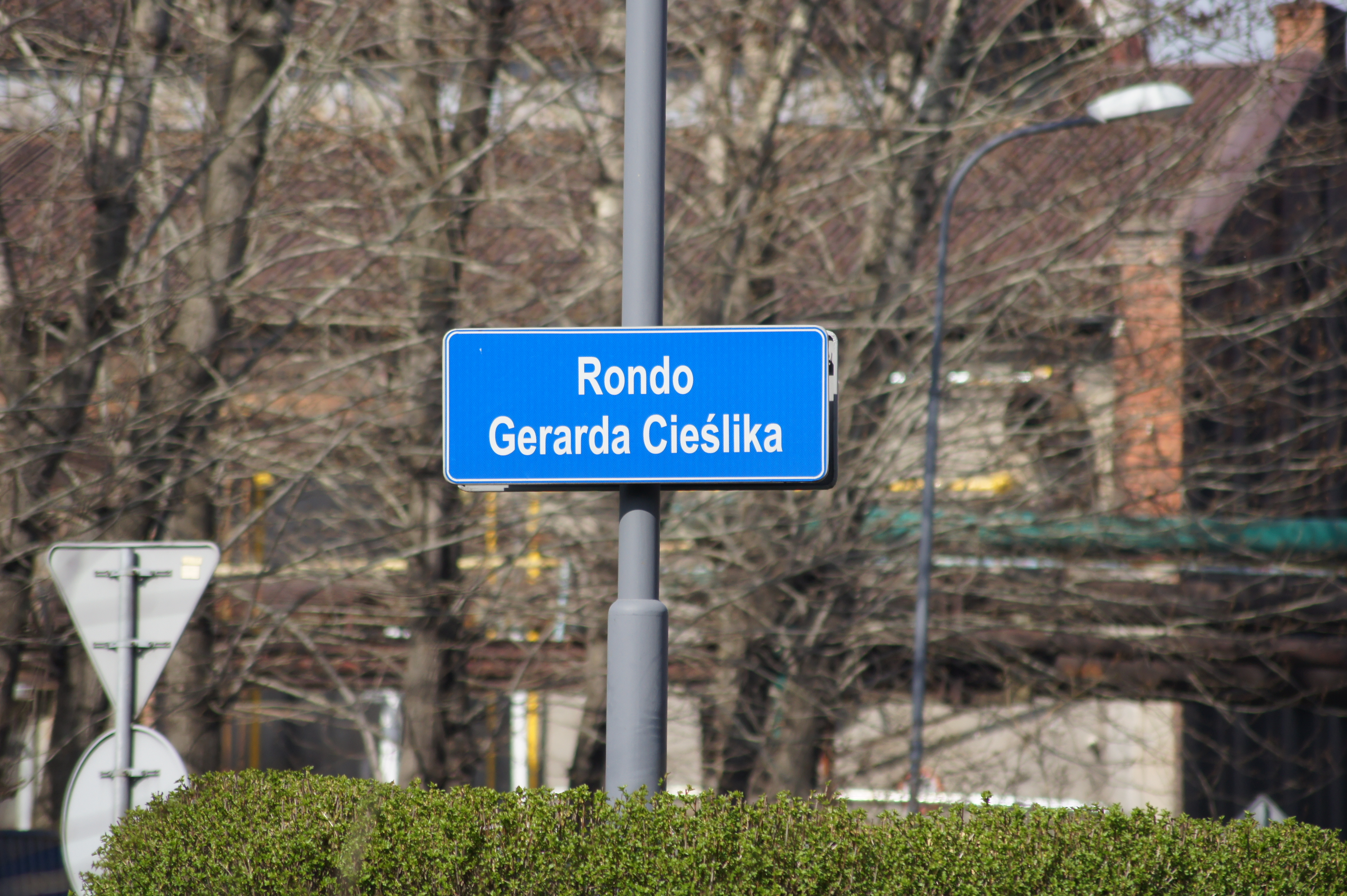 Tablica informacyjny przy rondzie im. Gerarda Cieślika w Chorzowie